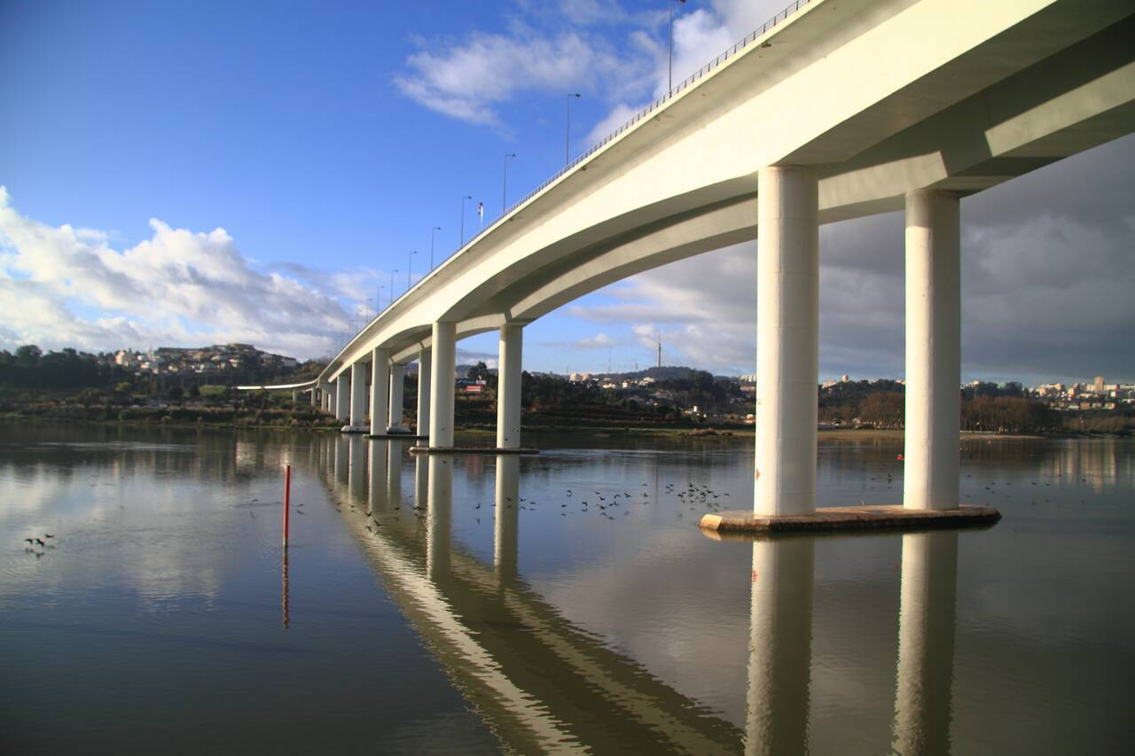 A Montante